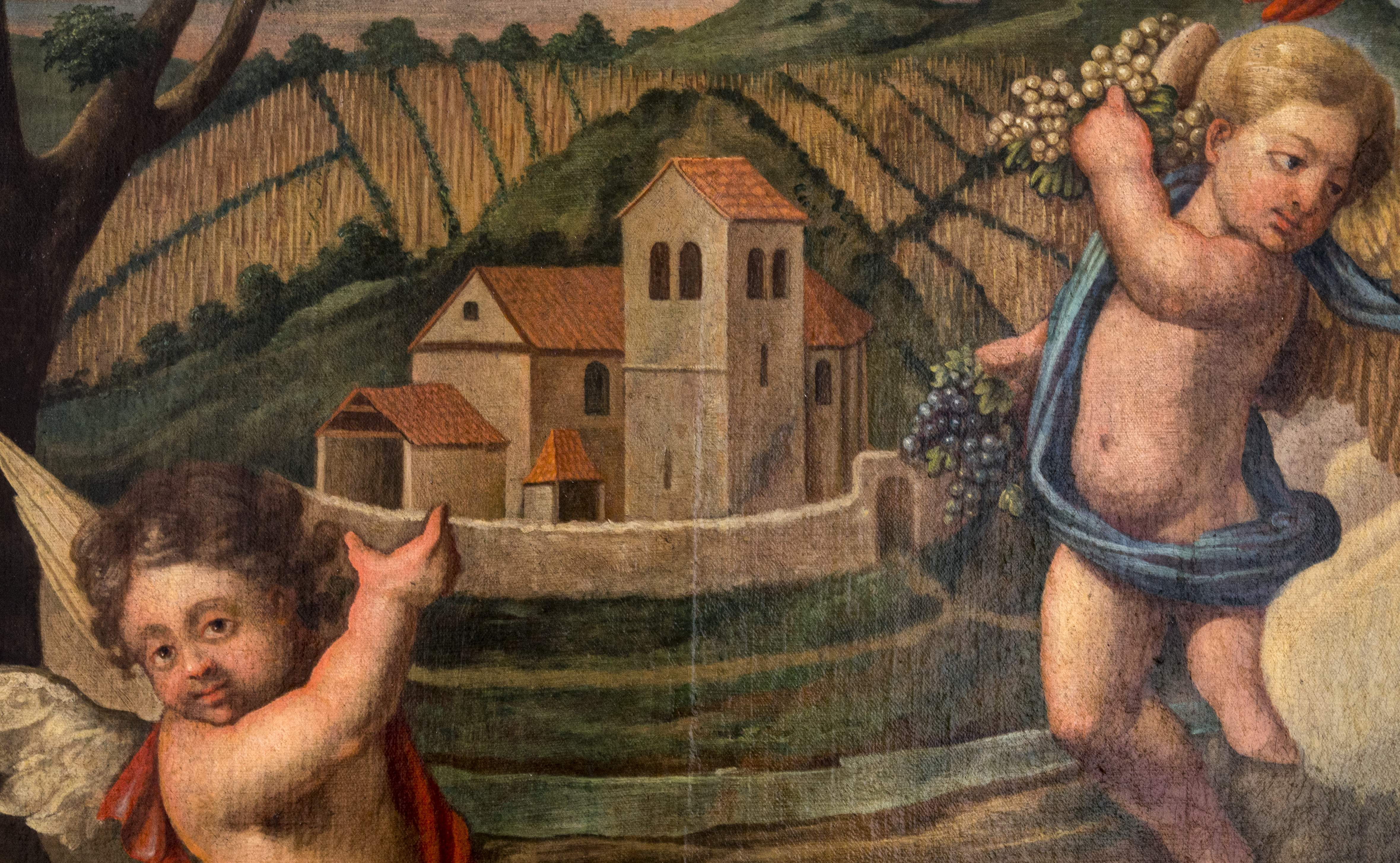 Bilder aus Freiburg